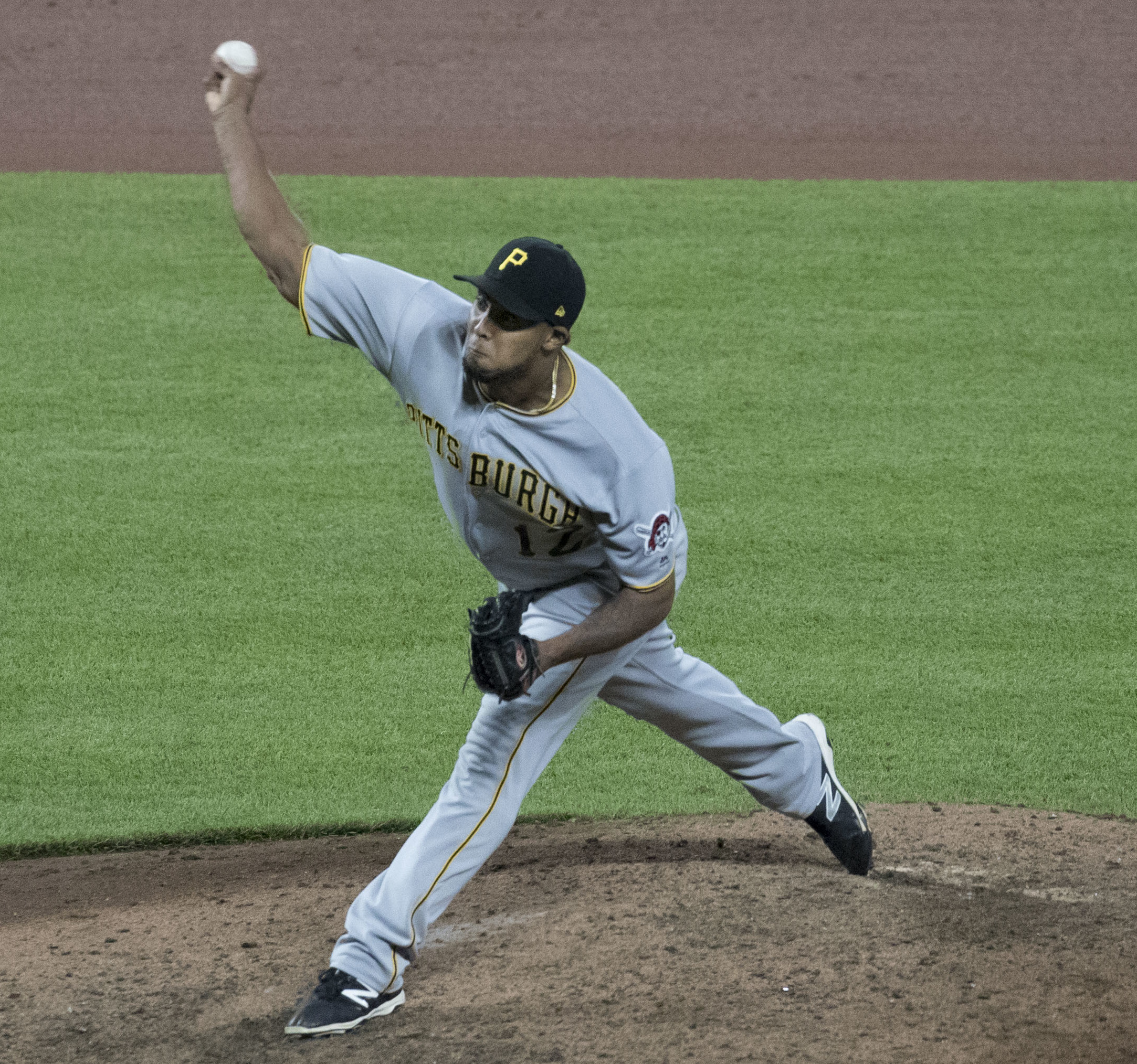 Pirates at Orioles 6/7/17